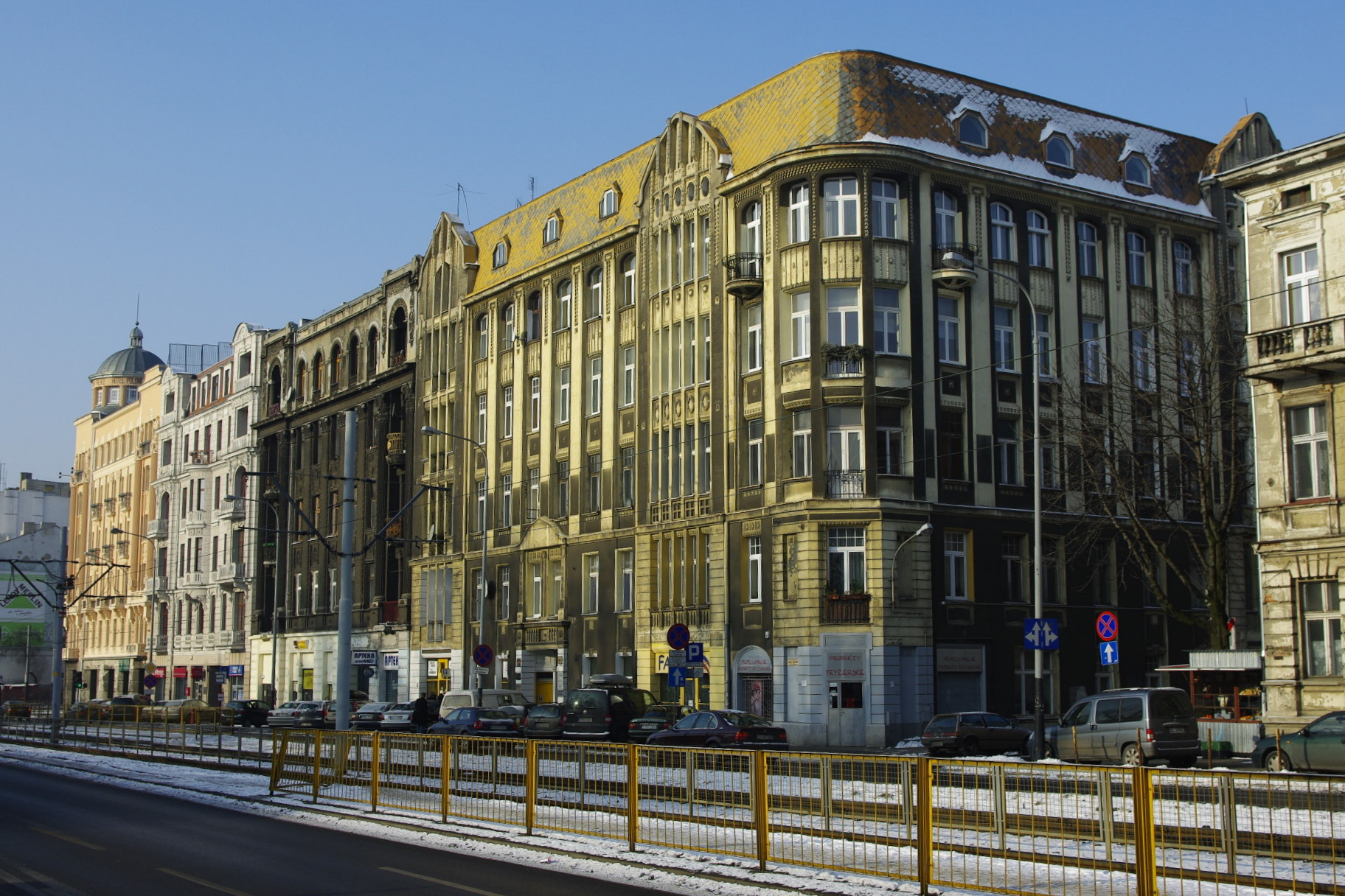 Kamienice przy ul. Narutowicza w Łodzi